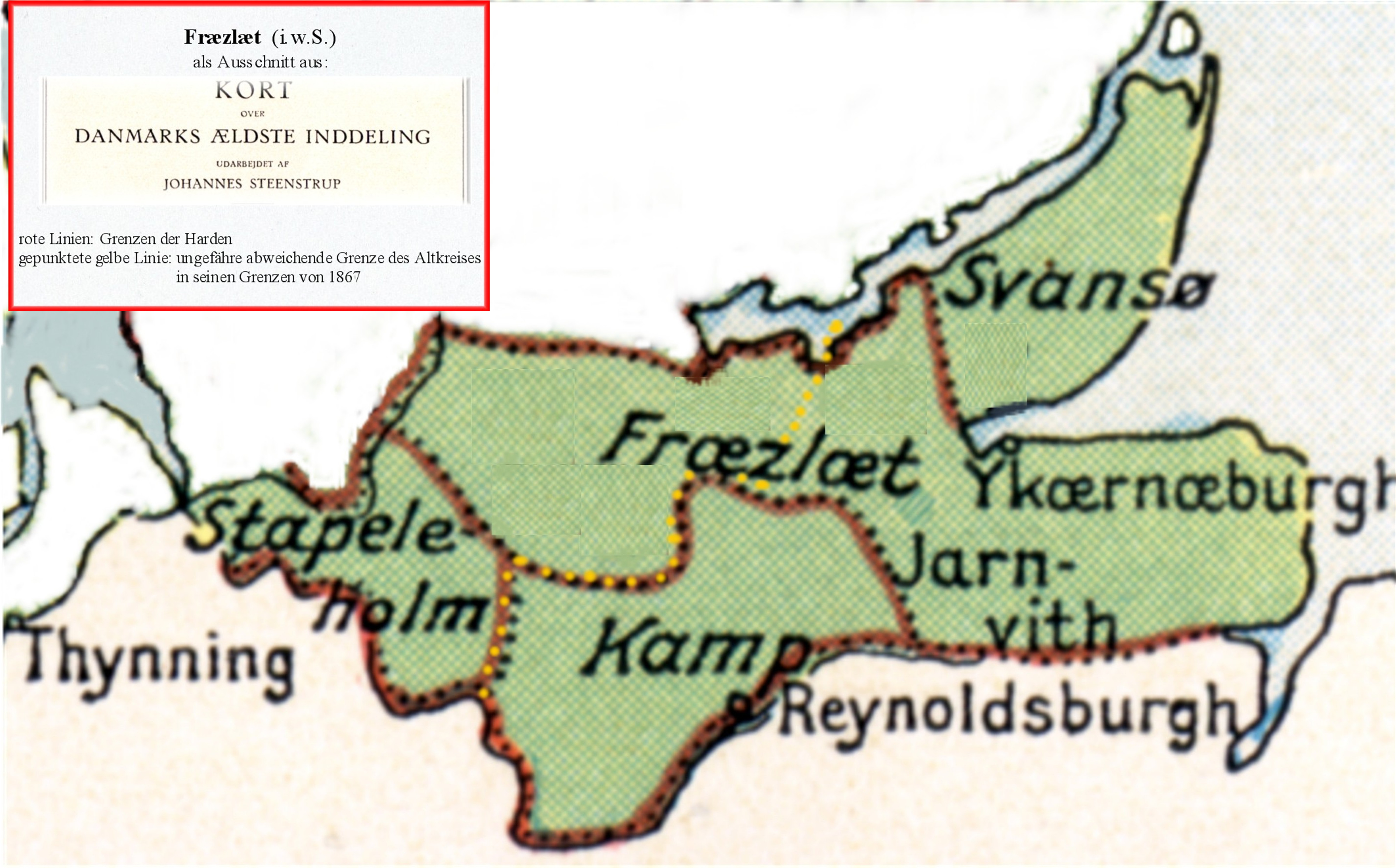 Fræzlæt - von mir selbst bearbeiteter Ausschnitt eines Wikipedia zur Verfügung gestellten Abbildes einer Karte